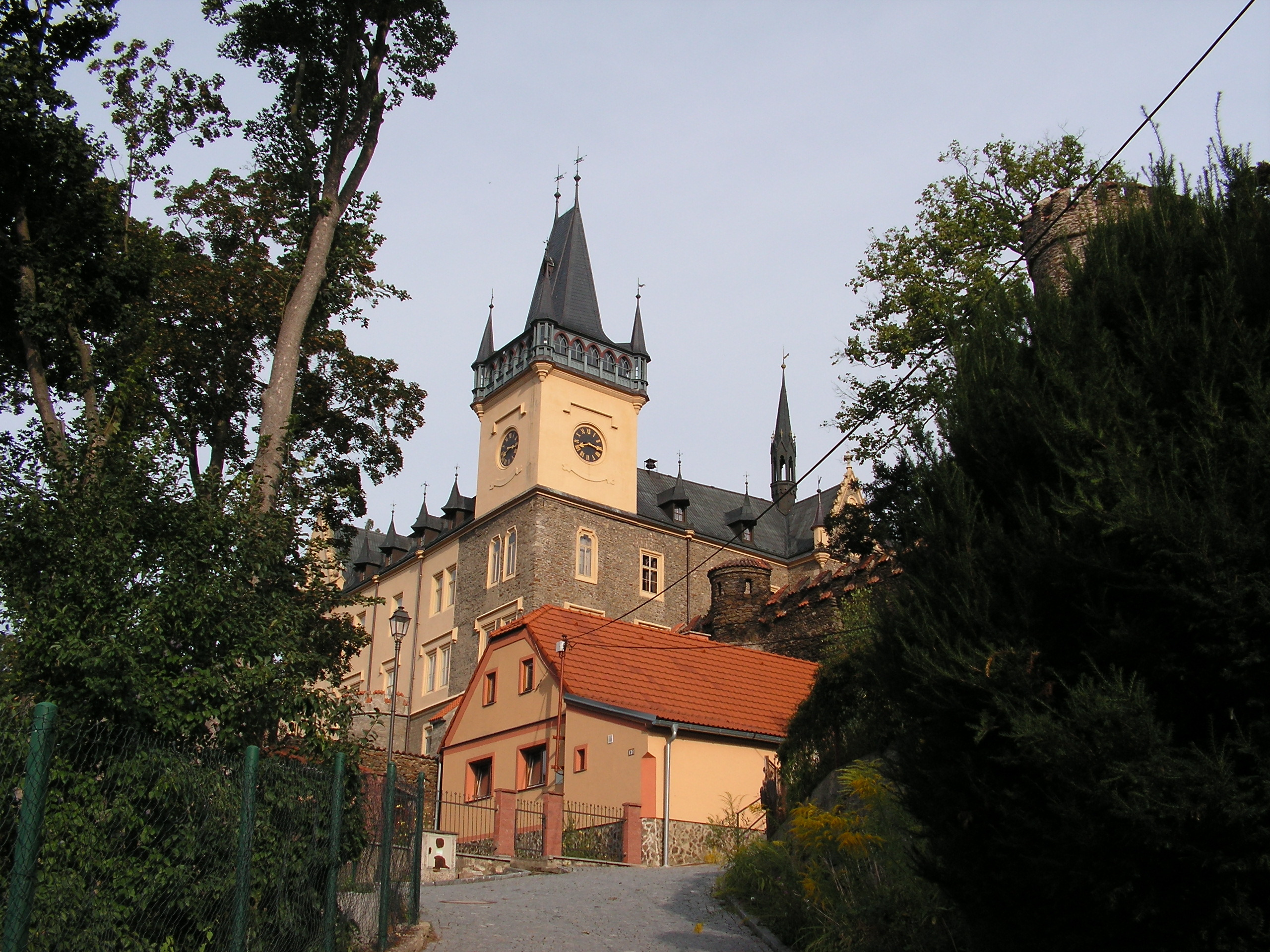 Zámek ve Zruči nad Sázavou v okrese Kutná Hora